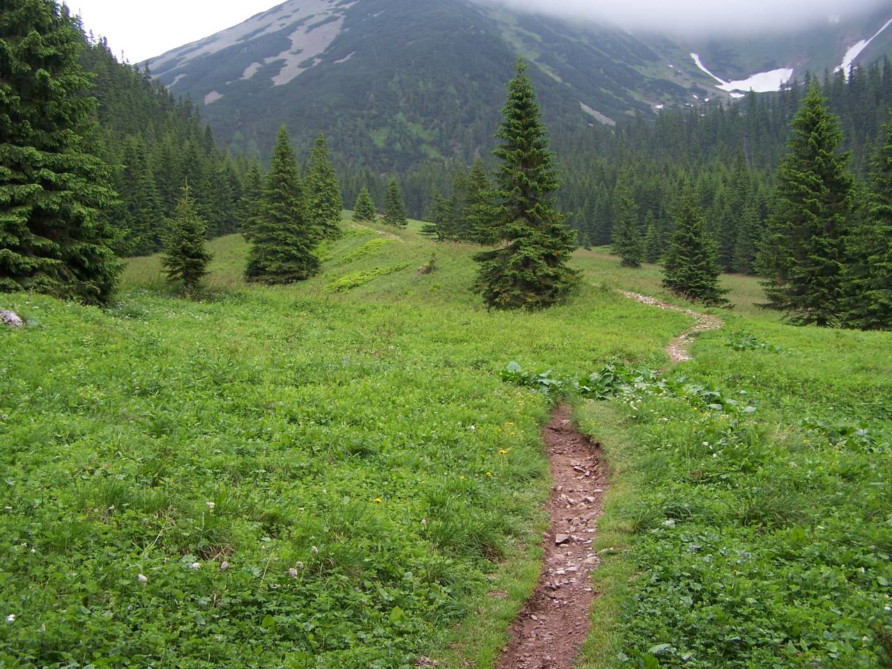 Wyżnia Polana Tomanowa (Tatra Mountains)